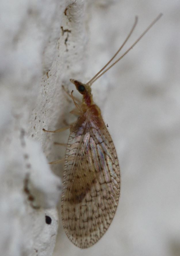 Hemerobius cf. humulinus am 18.5.2017 südlich von Mannheim